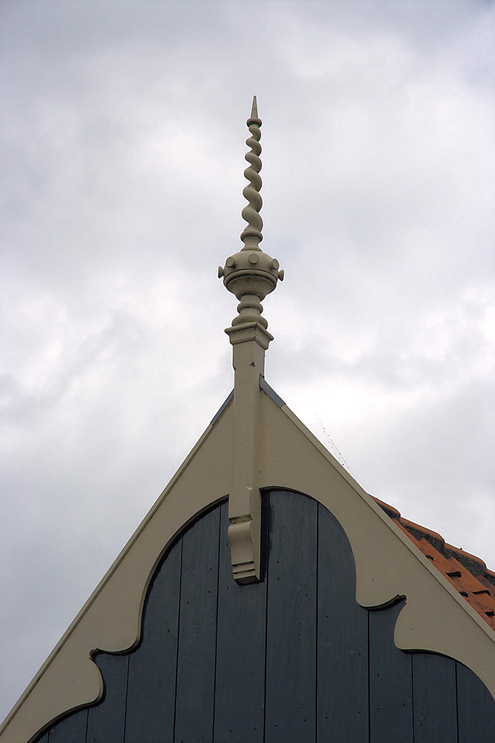 Zaanstad: Top van een gevel met fraaie gedraaide gevelmakelaar